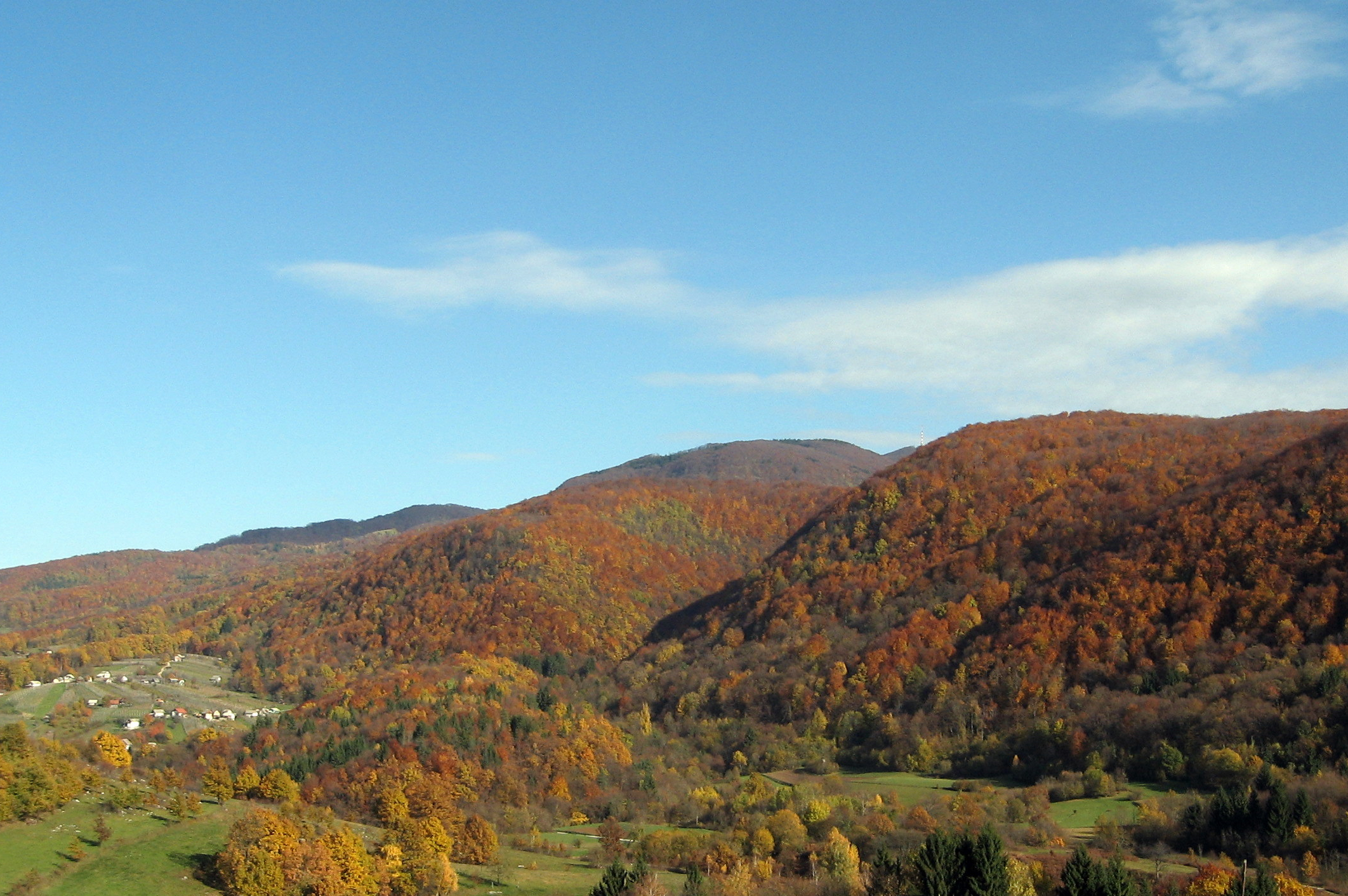 Gorjanci, Slovenija; viden je del naselja Pangrč Grm, vidi se (slabo sicer) tudi telekomunikacijski stolp na Trdinovem vrhu / Gorjanci, Slovenia